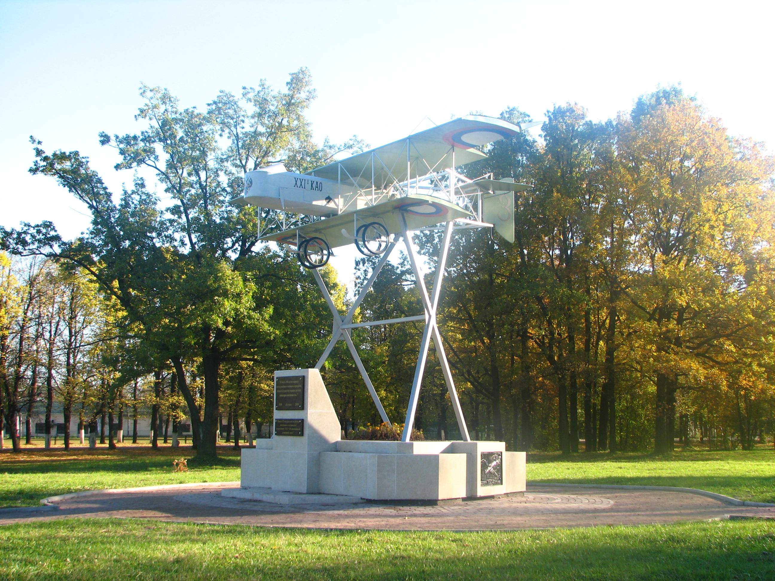 Памятник самолёту Фарман в Гатчине (сквер около Балтийского вокзала)